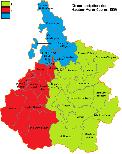 Circonscription des Hautes-Pyrénées en 1986